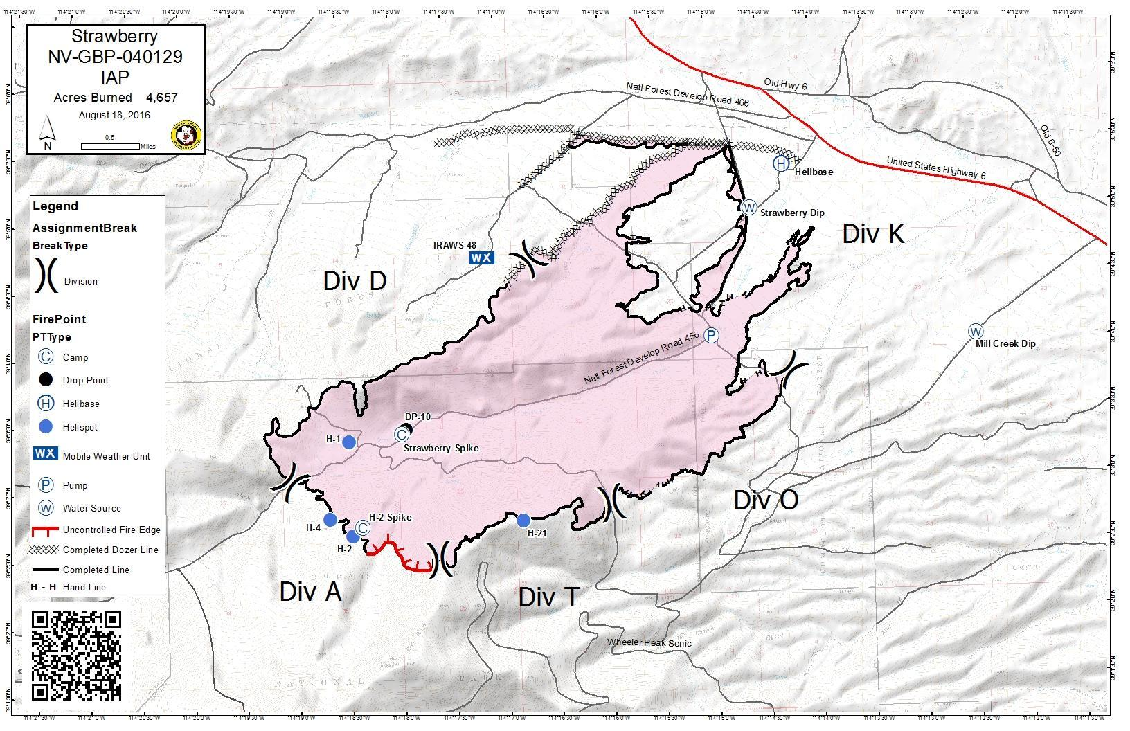 IR Map of the Strawberry Fire August 18, 2016